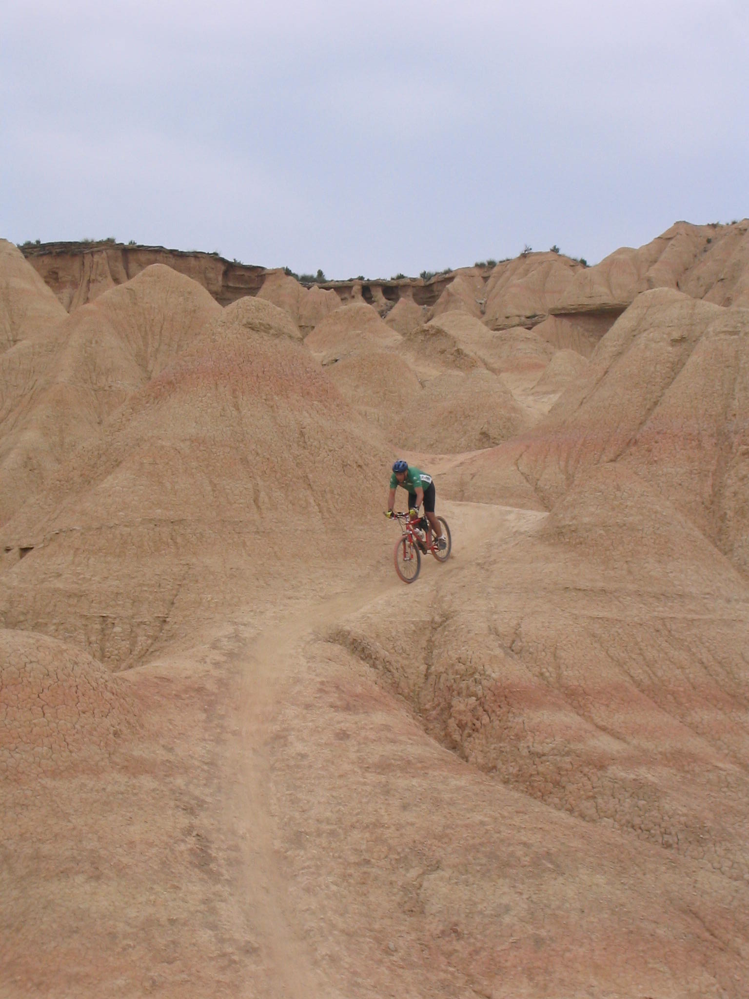 Bardenas Reales de Navarra, paso del Ciervo en la Bardena Blanca.